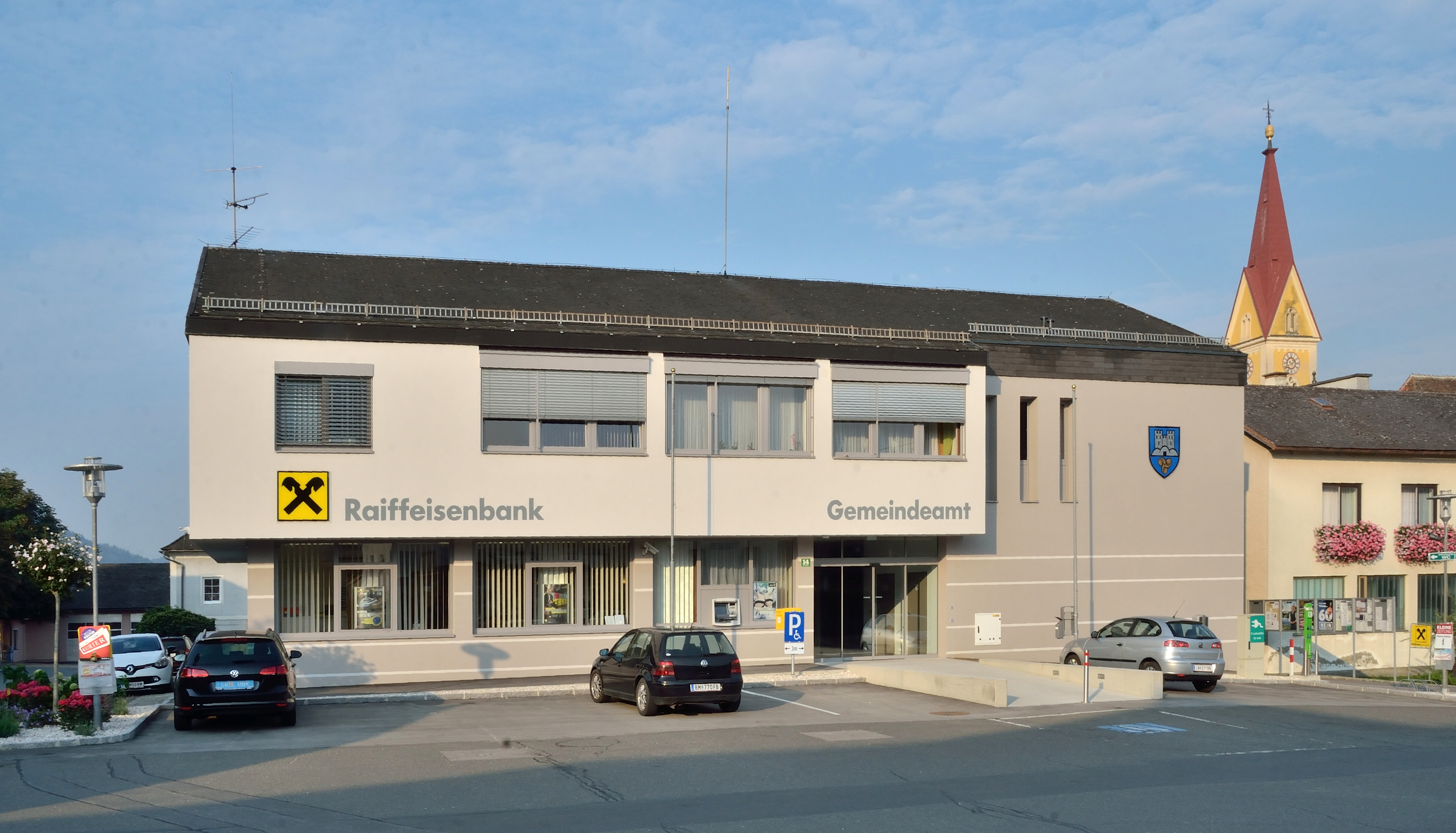 Gemeindeamt St. Stefan ob Leoben, Steiermark.